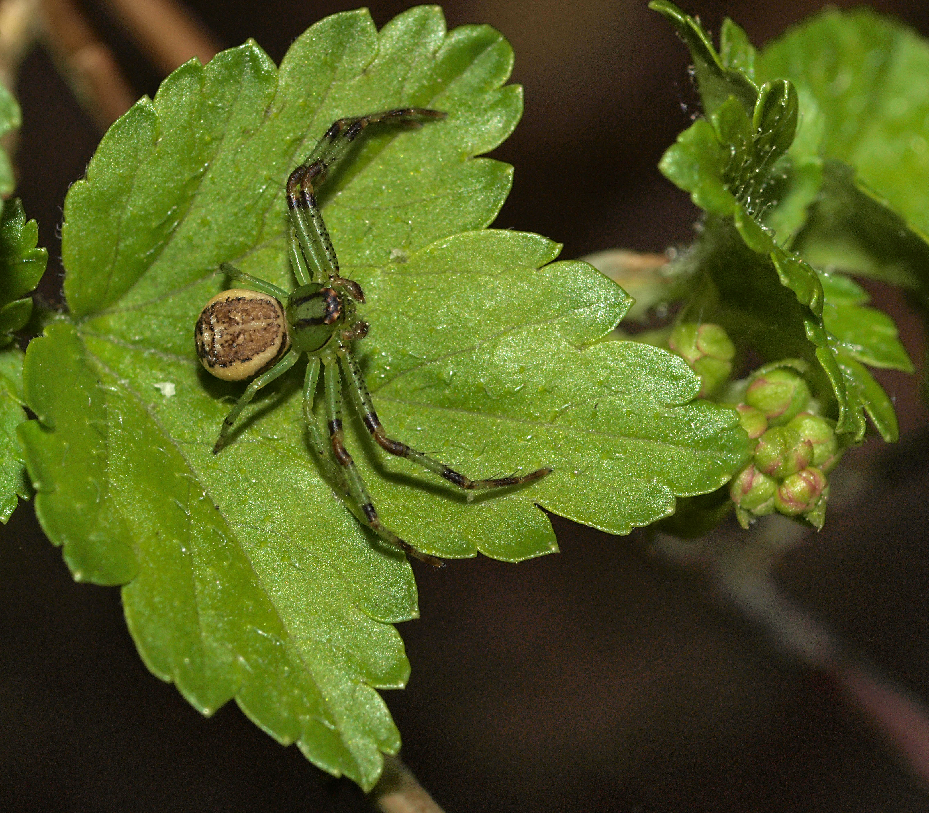 Grøn krabbeedderkop han.